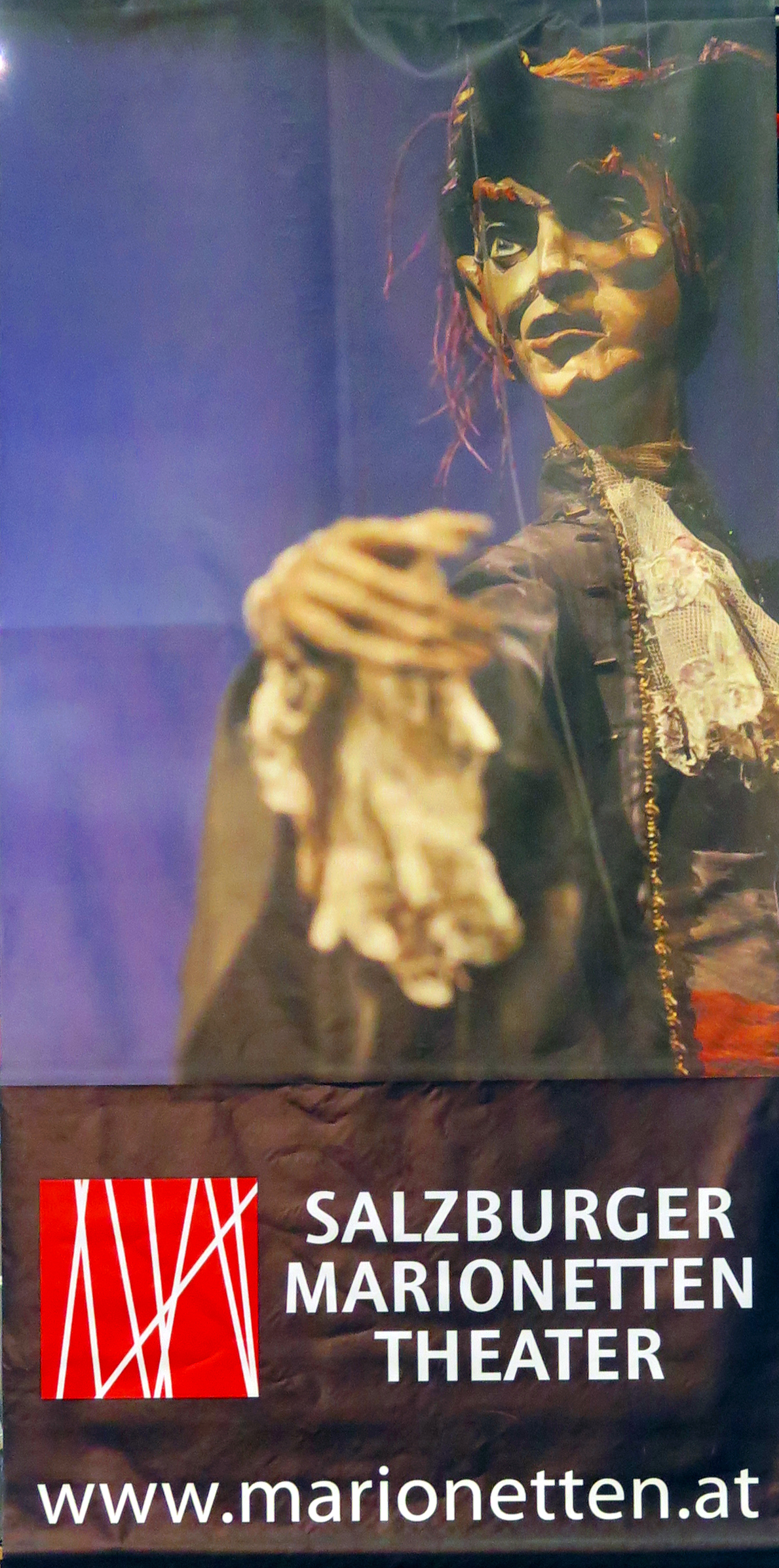 Plakat der Marionettenspieler auf der Monumento in Salzburg